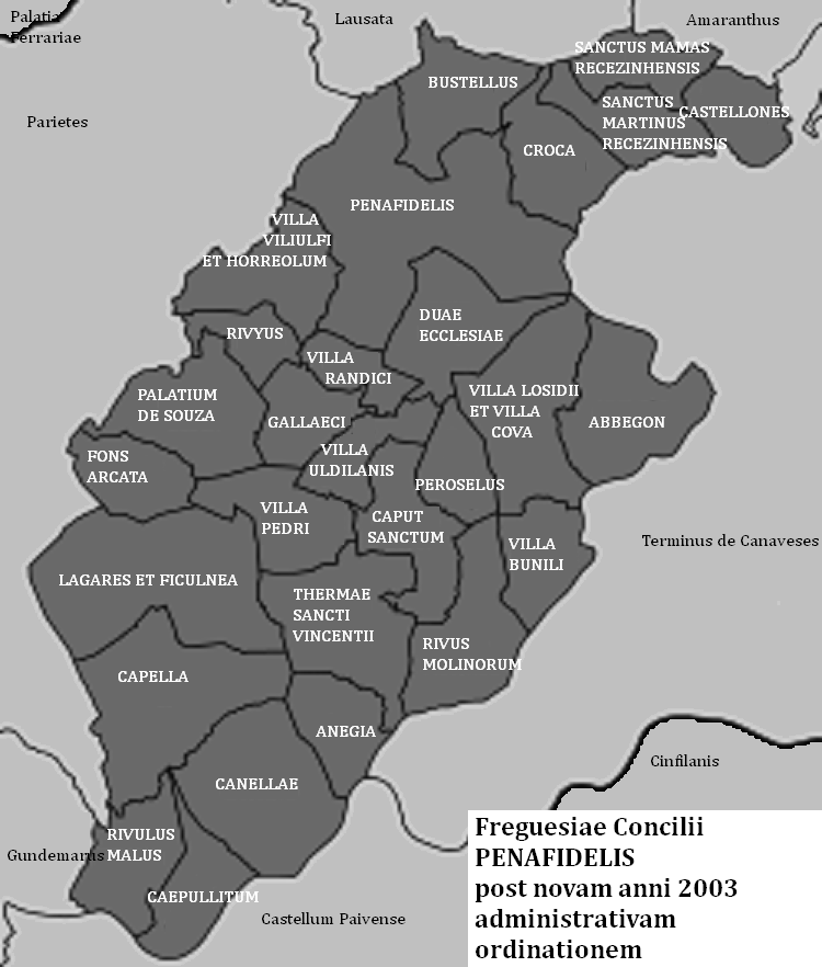 Concilii Penafidelis freguesiae post novam anni 2013 ordinationem administrativam